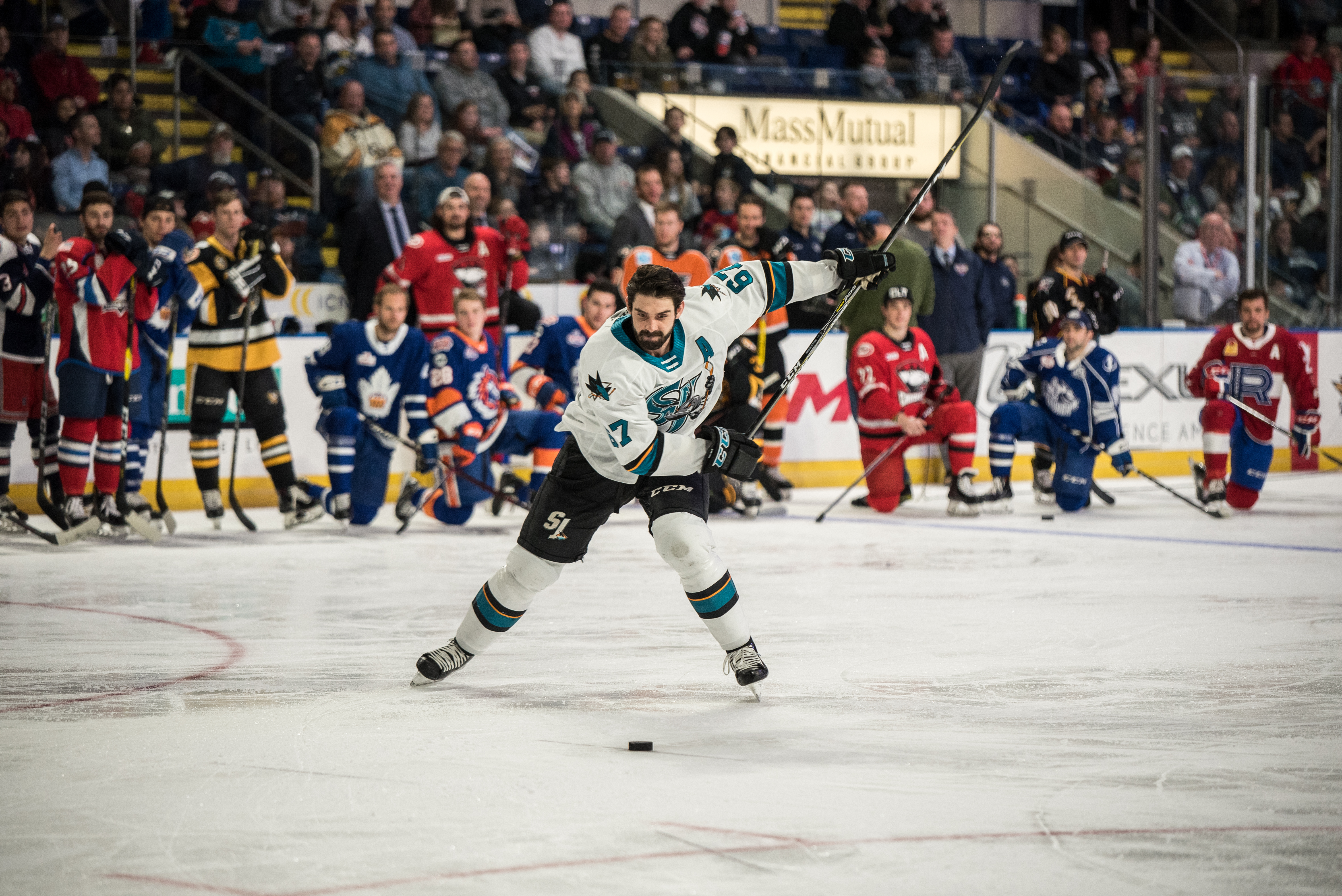 CYW_1703